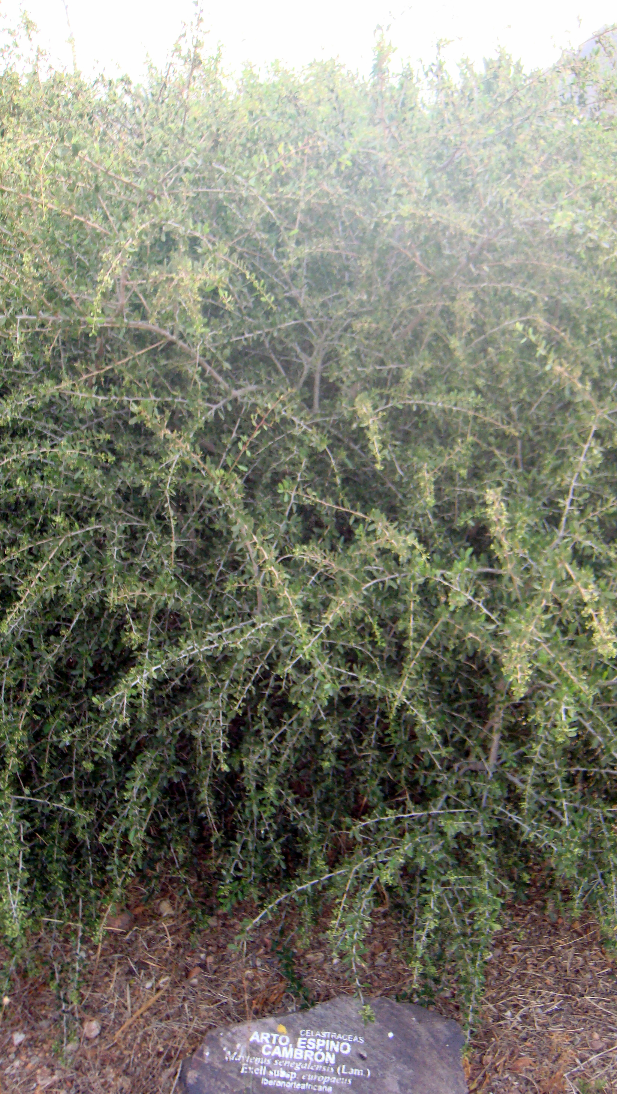 planta en el Jardín Botánico del Albardinal de Rodalquilar, en Nijar, provincia de Almería (España). Se encuentra dentro del Parque natural del Cabo de Gata-Níjar.